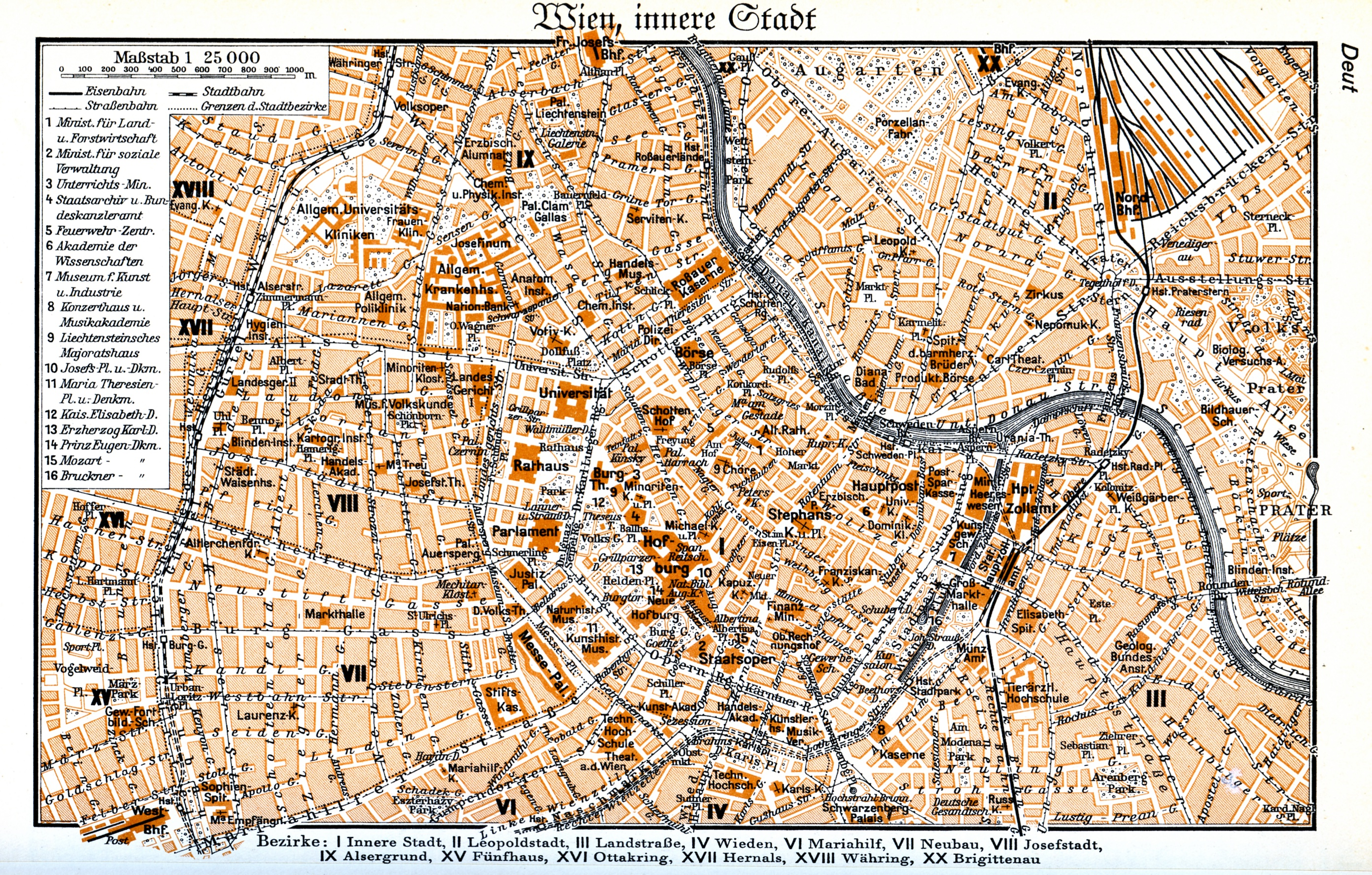 Vienna (center), 1937